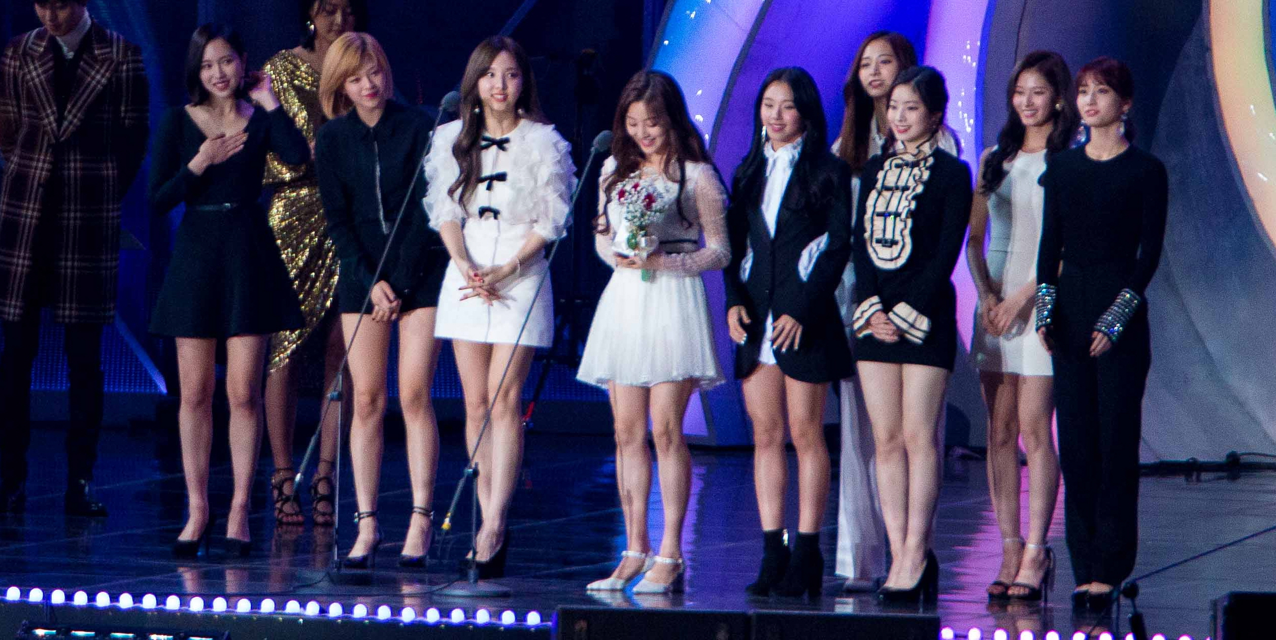 20171202 트와이스 멜론뮤직어워드